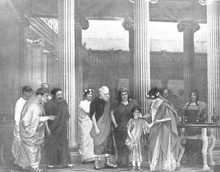 Escena del estreno de la obra de teatro Alceste, del escritor español Benito Pérez Galdós